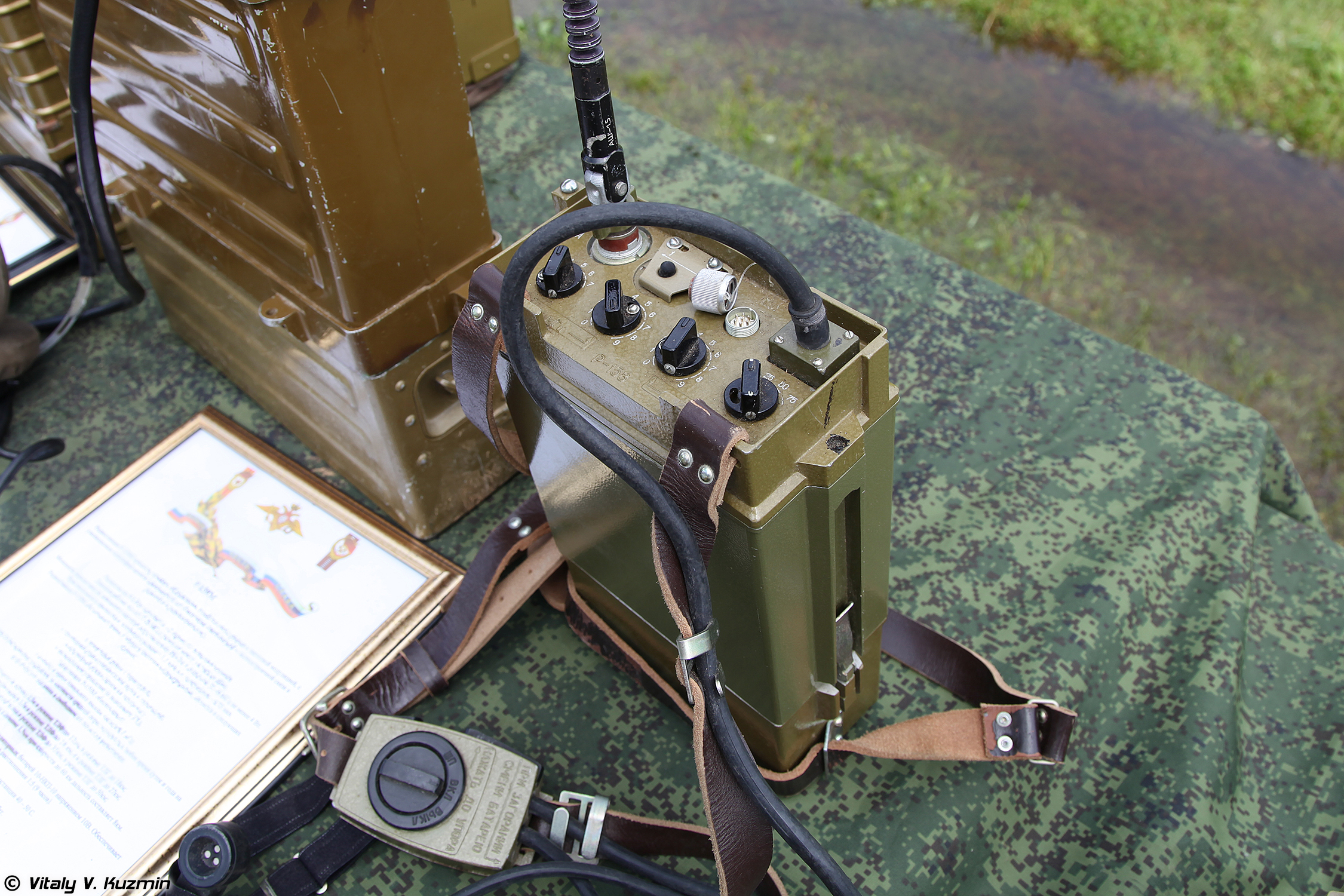 Радиостанция Р-158 (R-158 radio)